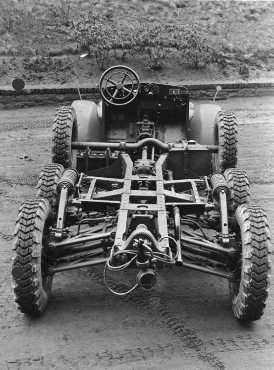 Fahrzeuge